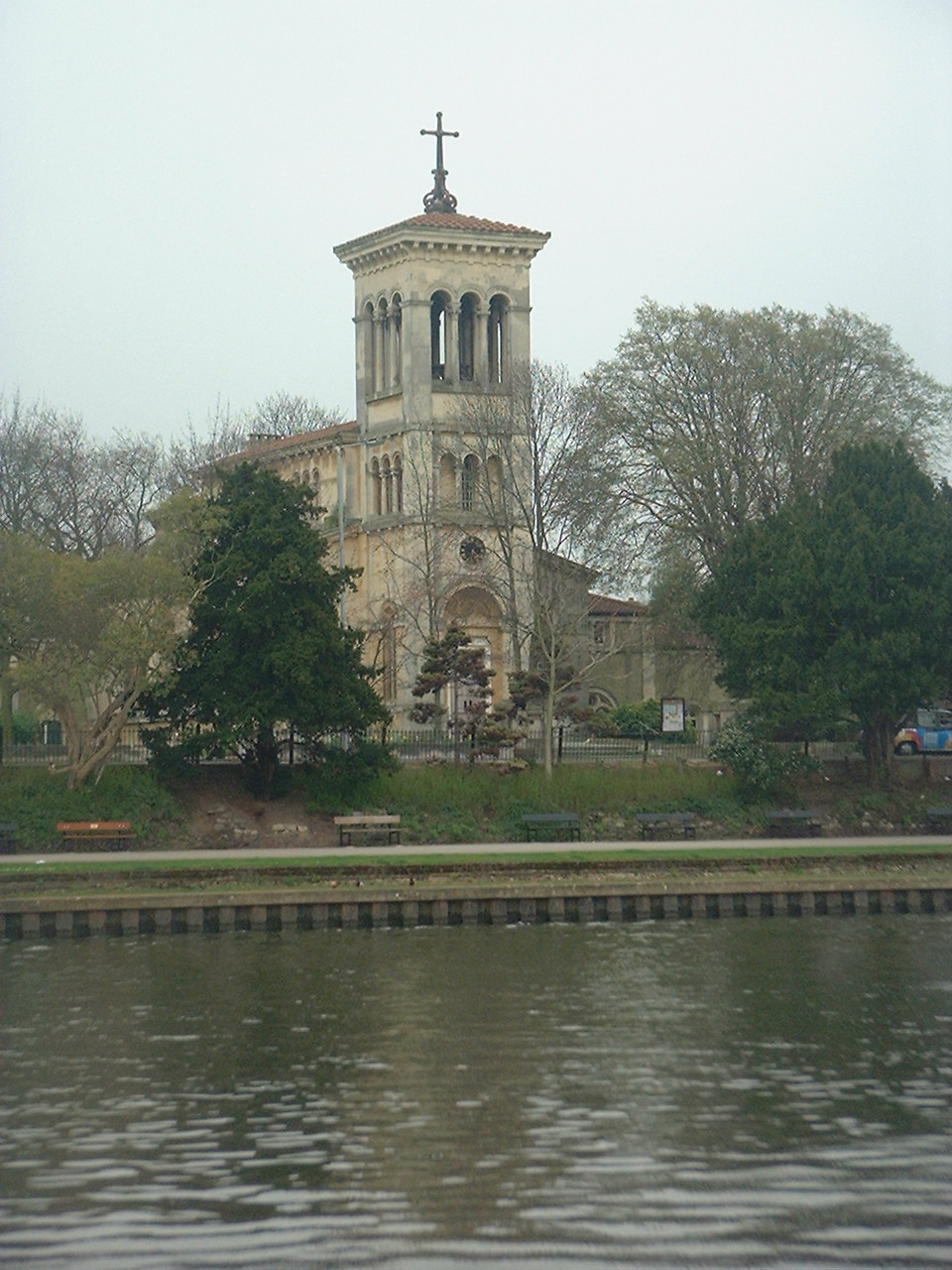 St Raphaels Kingston (RC)